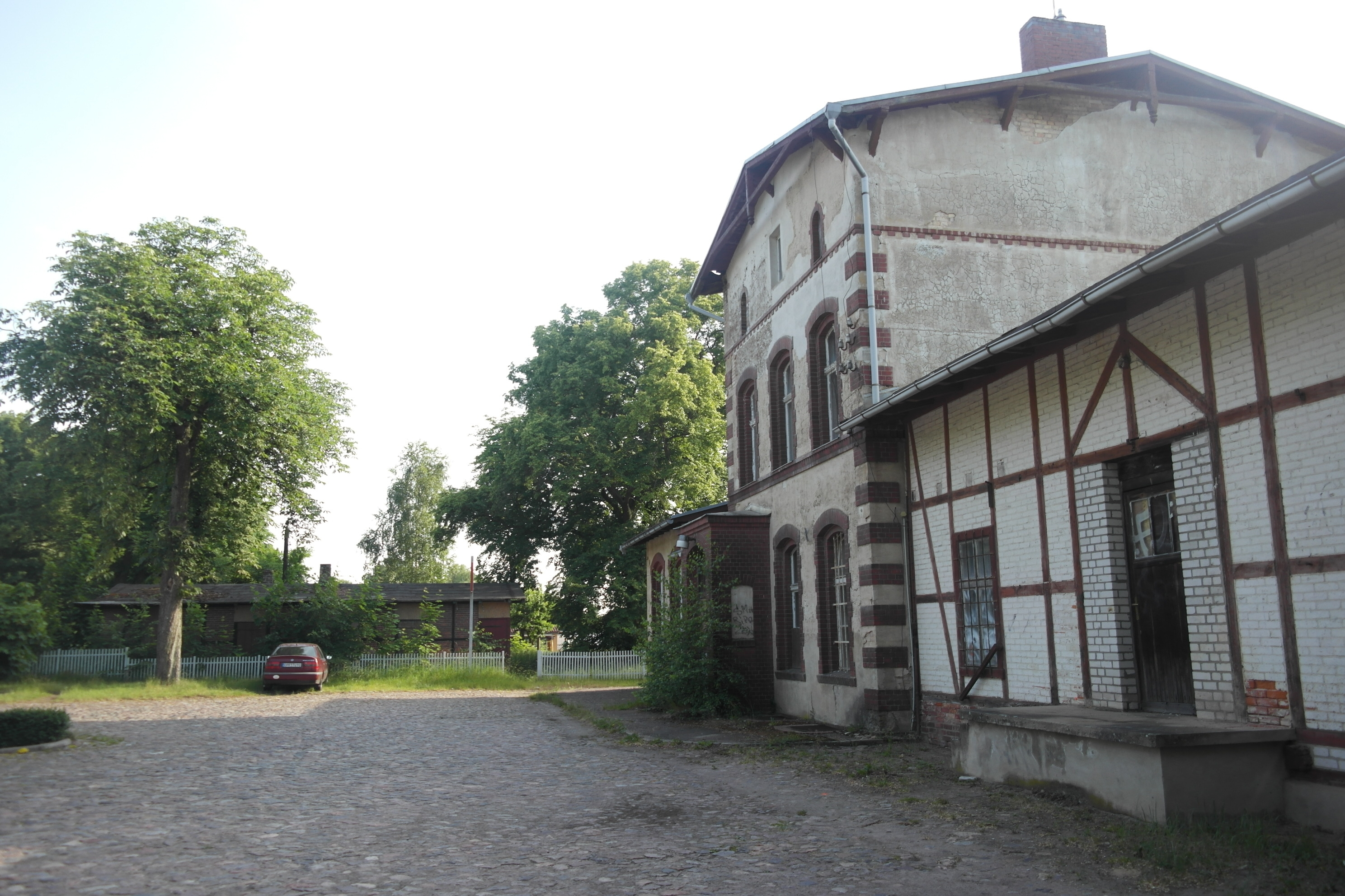 Bahnhof Lindow (Mark), Straßenseite